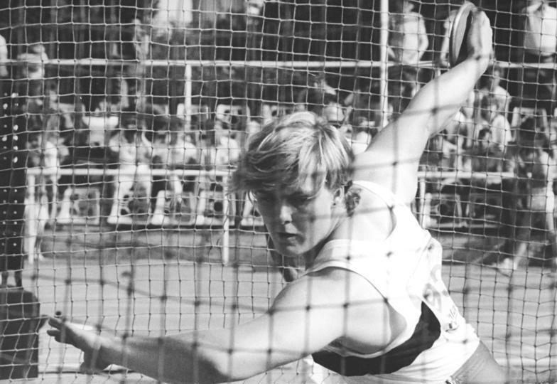 Ilke Wyludda ADN-ZB Häßler -23.6.89 Neubrandenburg: Leichtathletik-Sportfest um den "Vier-Tore-Pokal"- Jahresbestleistung erreichte Ilke Wyludda (SC Chemie Halle) im Diskuswerfen mit 72,72 m.